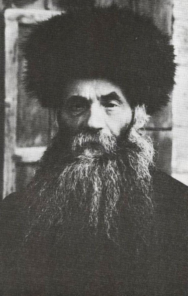 Rabbi Isser Zalman Meltzer, (1870 - 1953)